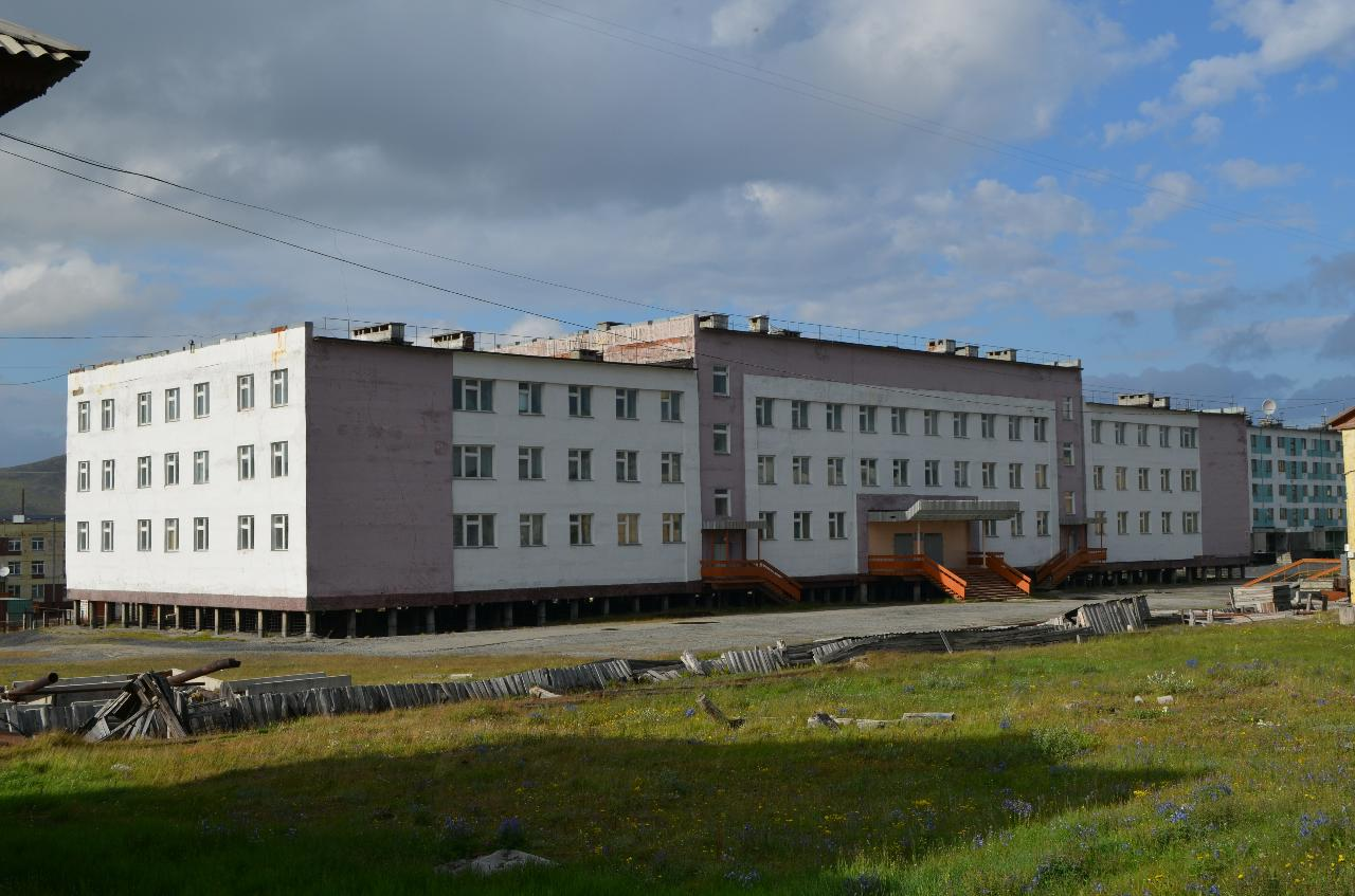 Тикси. Средняя школа № 3